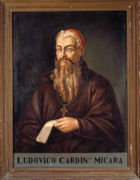 Cardinale Ludovico Micara